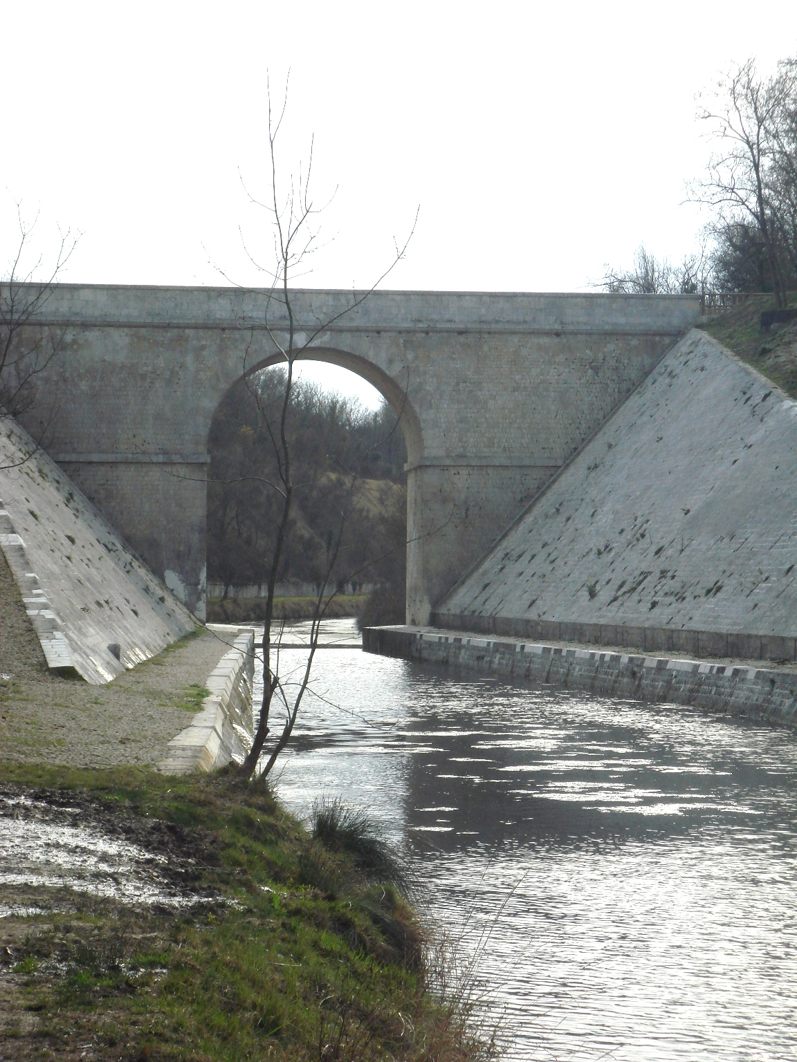 Canal de Marans à La Rochelle, Pont de Belle-Croix à Dompierre-sur-Mer (vue nord).